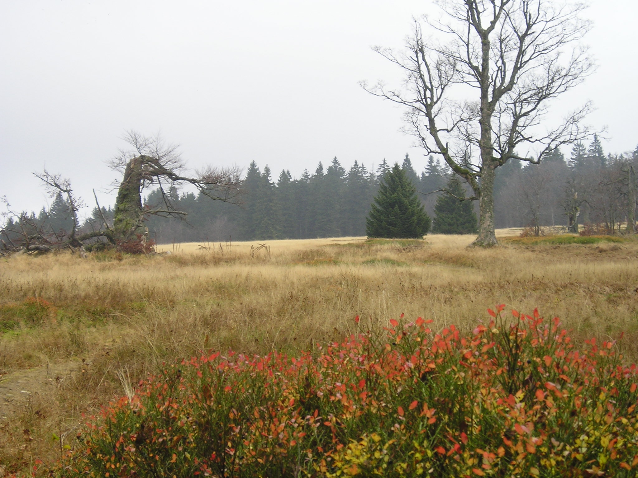 nature